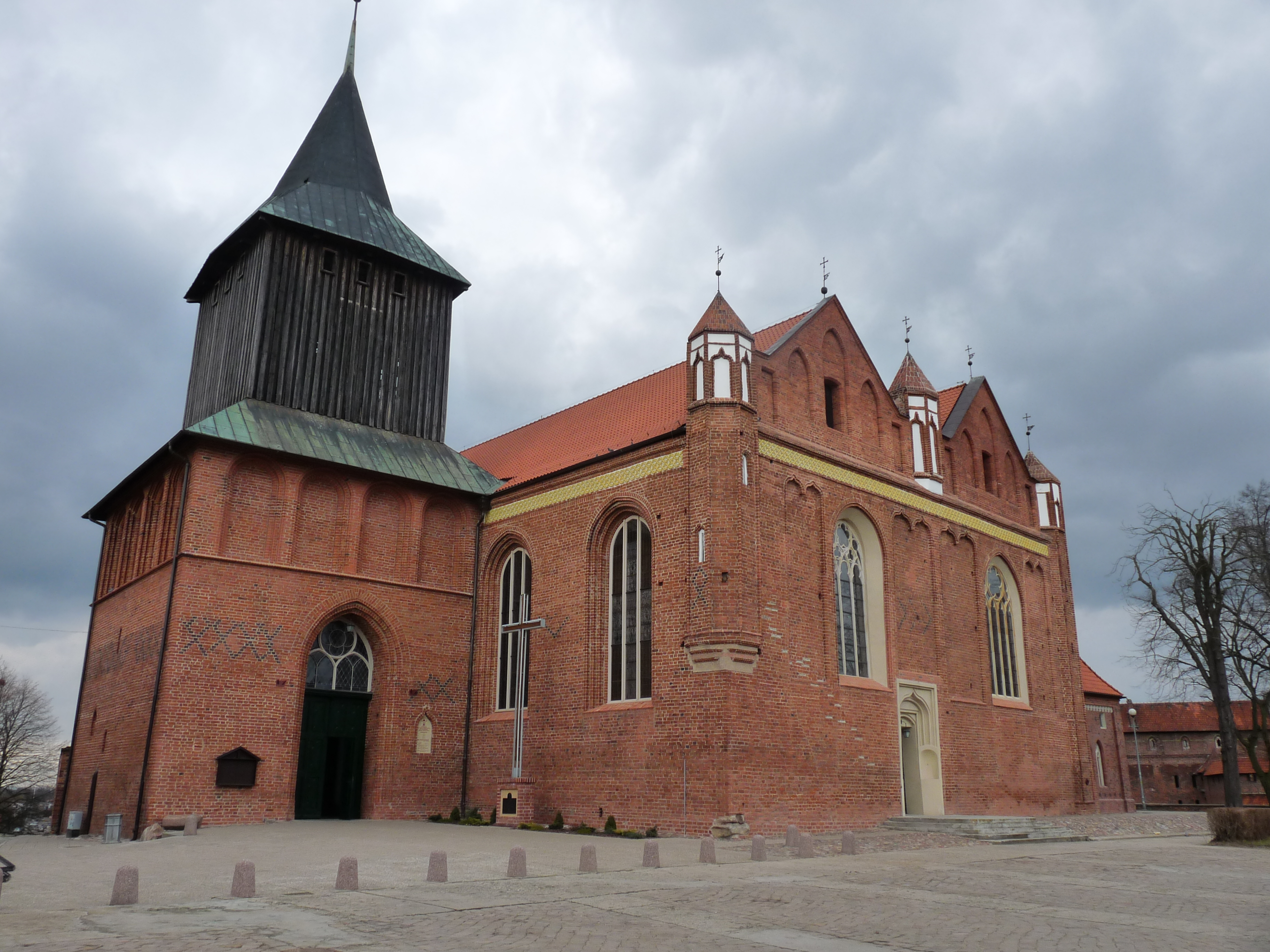 Malbork, kościół par. p.w. św. Jana Chrzcicielela, kon. XIII, 1468, 1851